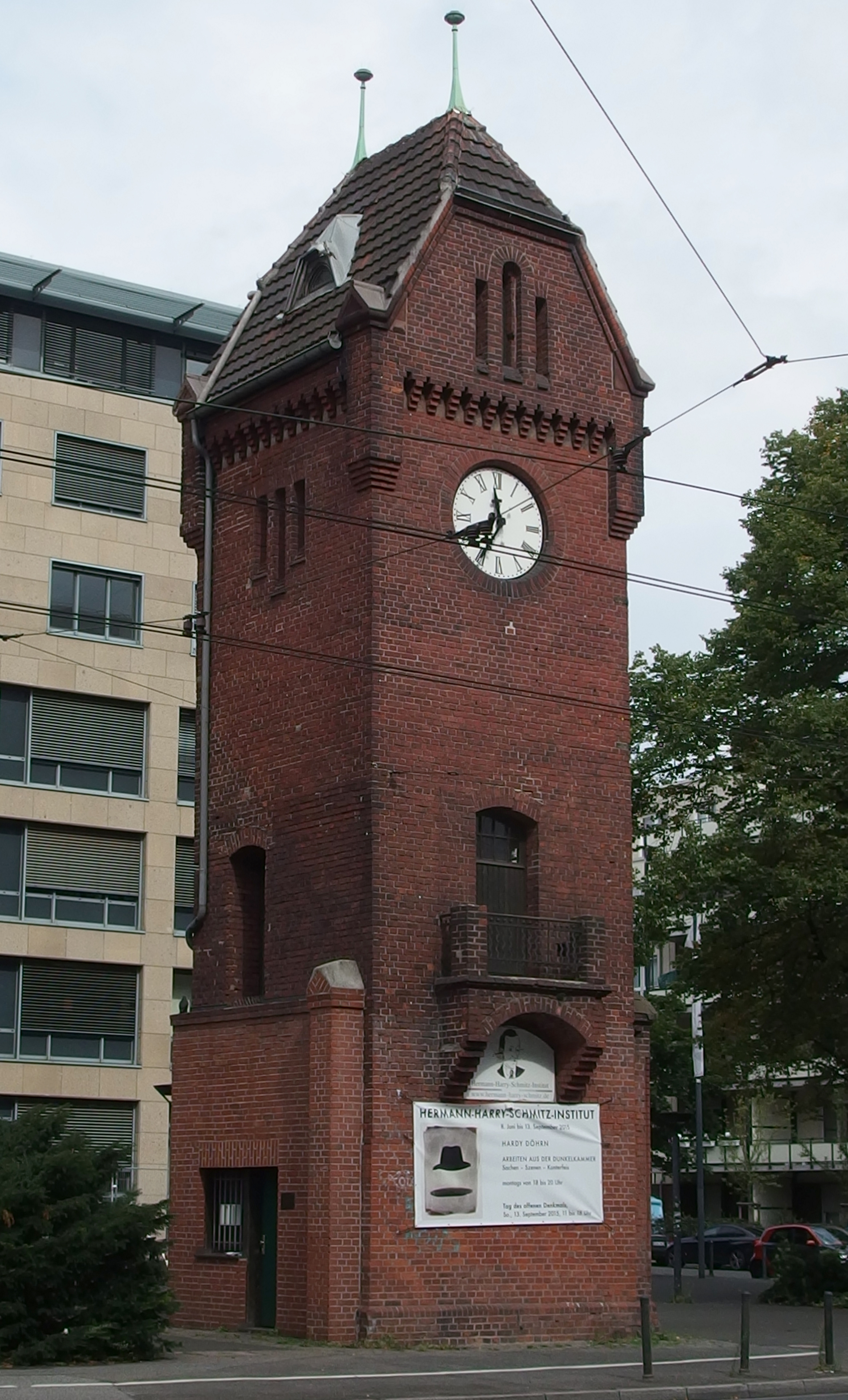 An der Grafenberger Allee steht ein einsamer alter Uhrenturm. Er stand einst auf dem Werksgelände der Eisengießerei Haniel & Lueg, die 1975 ihre Tore schloss. Der im Jahre 1875 erbaute und heute denkmalgeschützte Uhrenturm diente damals als Torwärterhaus. Durch ihn gelangten die Arbeiter in das Werk. Der Turm wurde 1995 aufwändig renoviert. Heute befinden sich dort das „Herrmann-Harry-Schmitz-Institut“ und die „Hermann-Harry-Schmitz-Societät“.